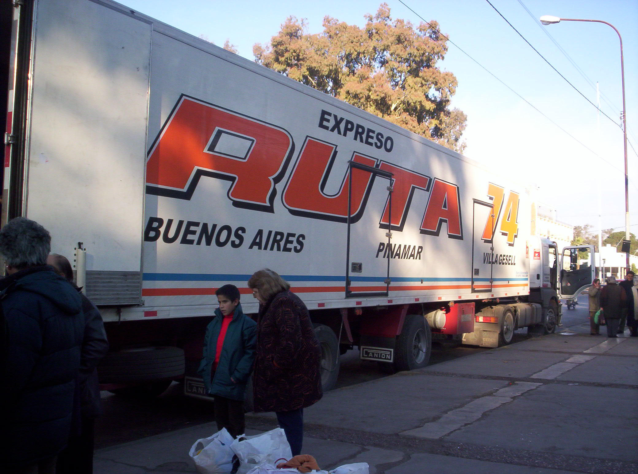 Vista del camión que recolecto donaciones para tres escuelas de Cuyo, realizado por el programa de canal 7 Estudio País 24. Esta fotografía lo muestra al Expreso 74, en la ciudad de San Juan, Argentina